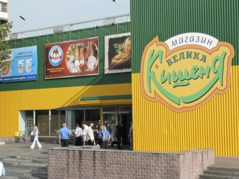 Украинский супермаркет "Велика Кишеня" на ст. м. Героев Днепра